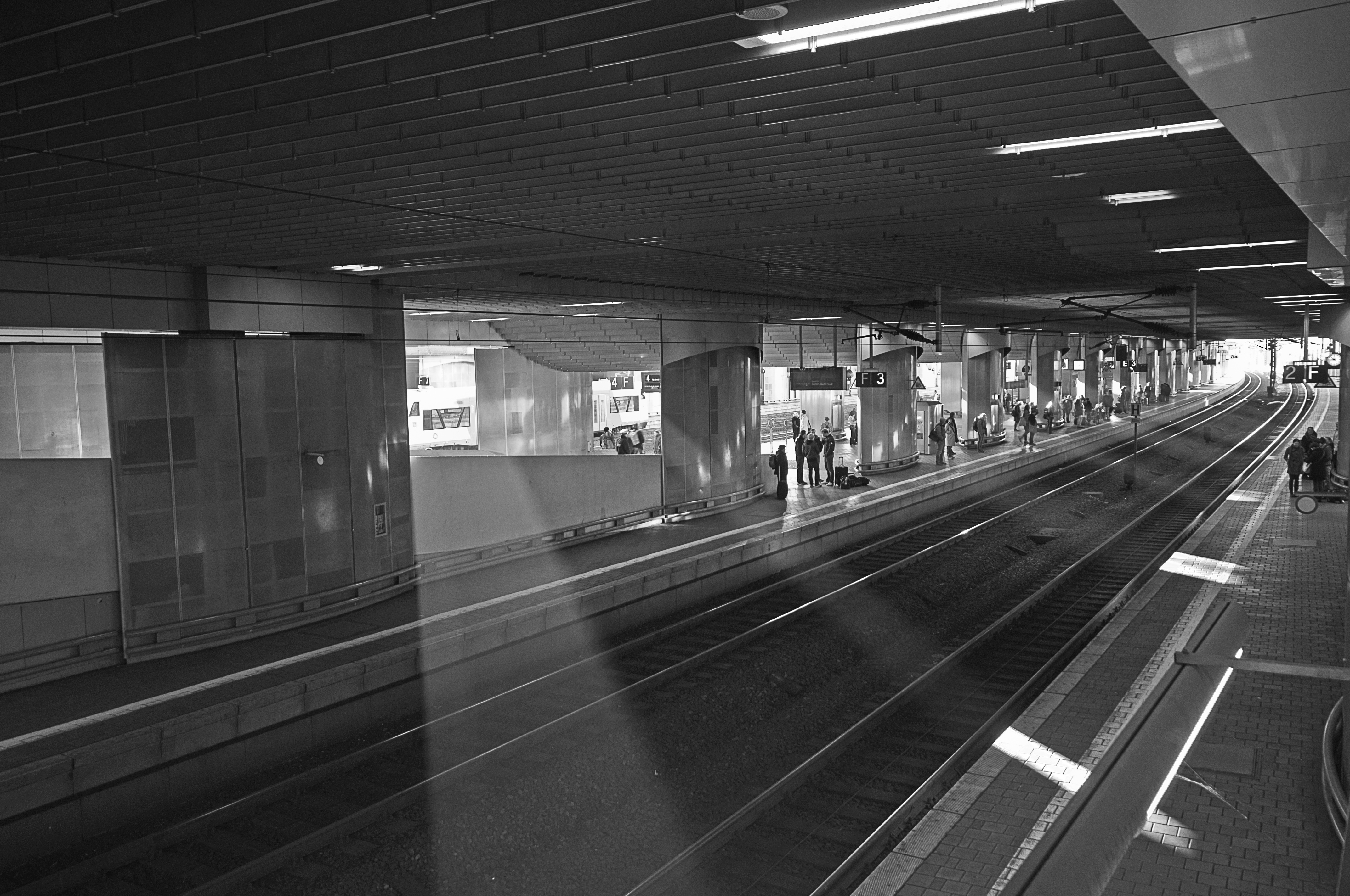 Kassel Bahnhof Wilhelmshöhe